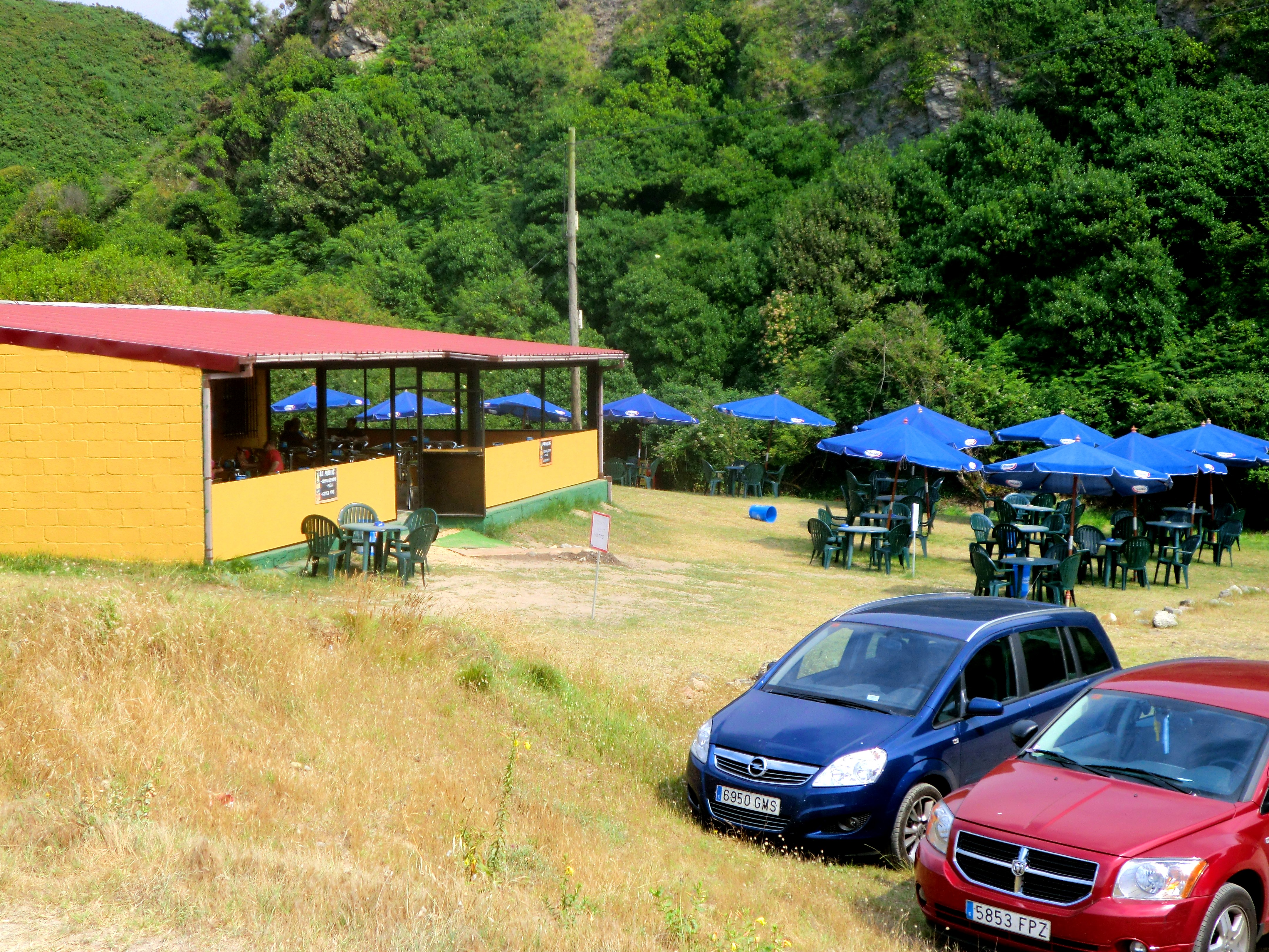 Restaurant am Palya des Xago